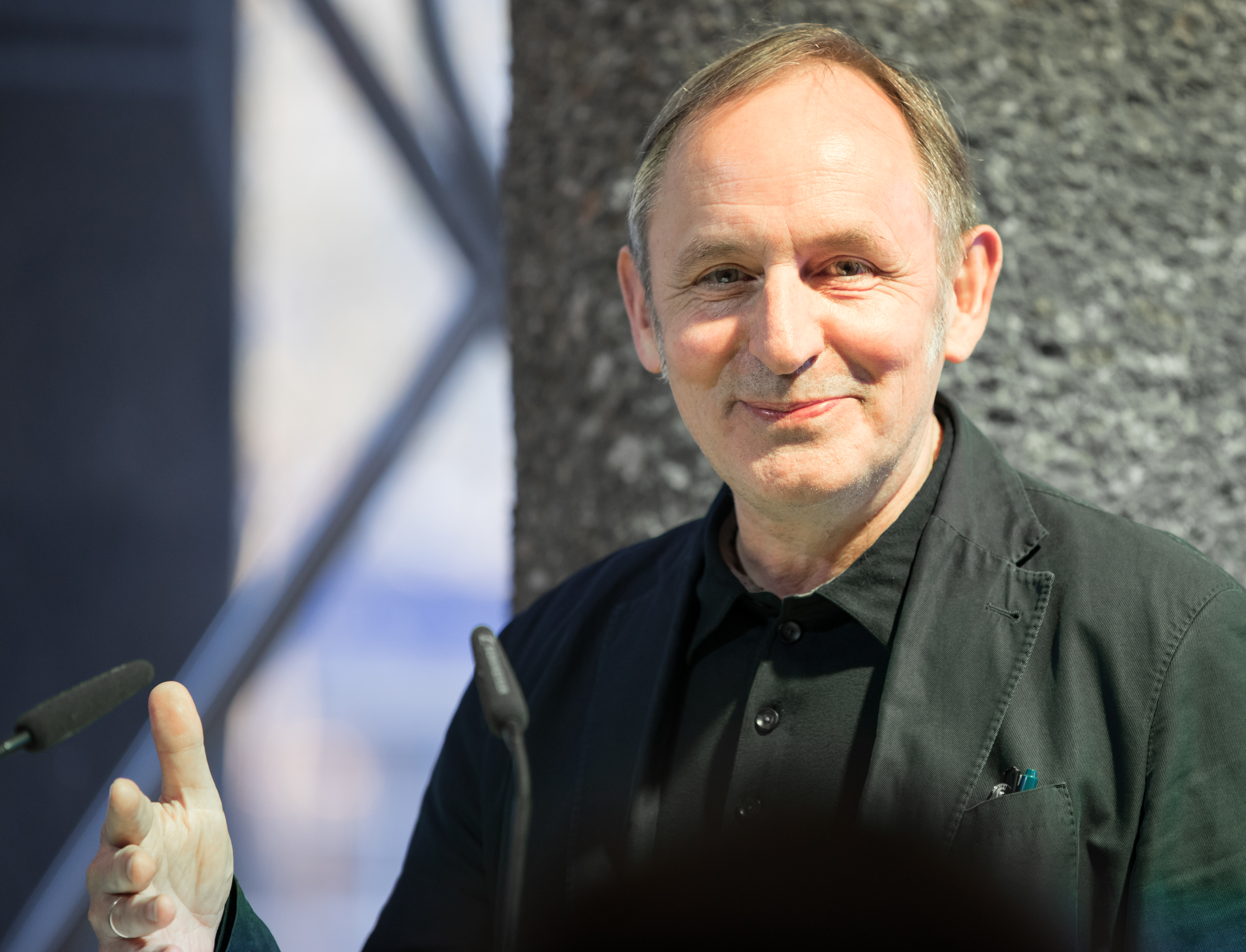 Volker Staab, deutscher Architekt, bei der Ausstellungseröffnung und Vorstellung der Überarbeitung der Planungen für die „Historische Mitte“ in Köln.